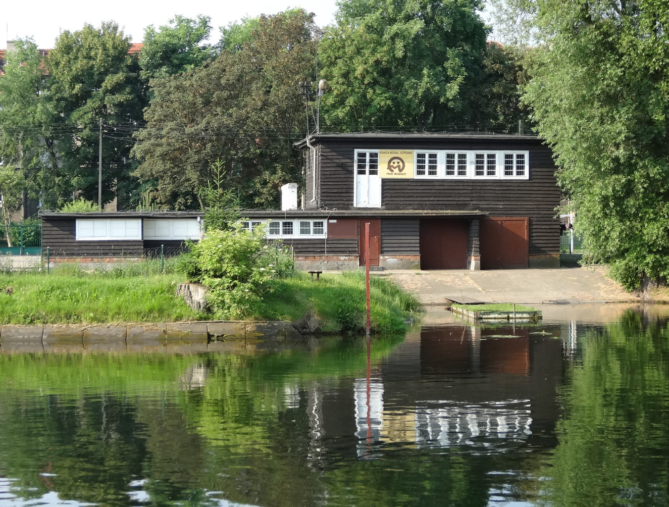 Stanica wodna Kopernik nad Brdą w Bydgoszczy